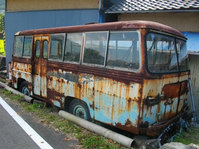 日産エコーGC140の草ヒロである